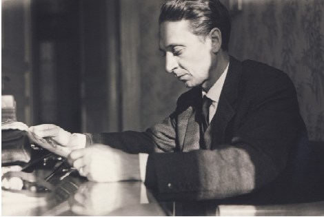 Alfonso Campanile nel maggio del 1964